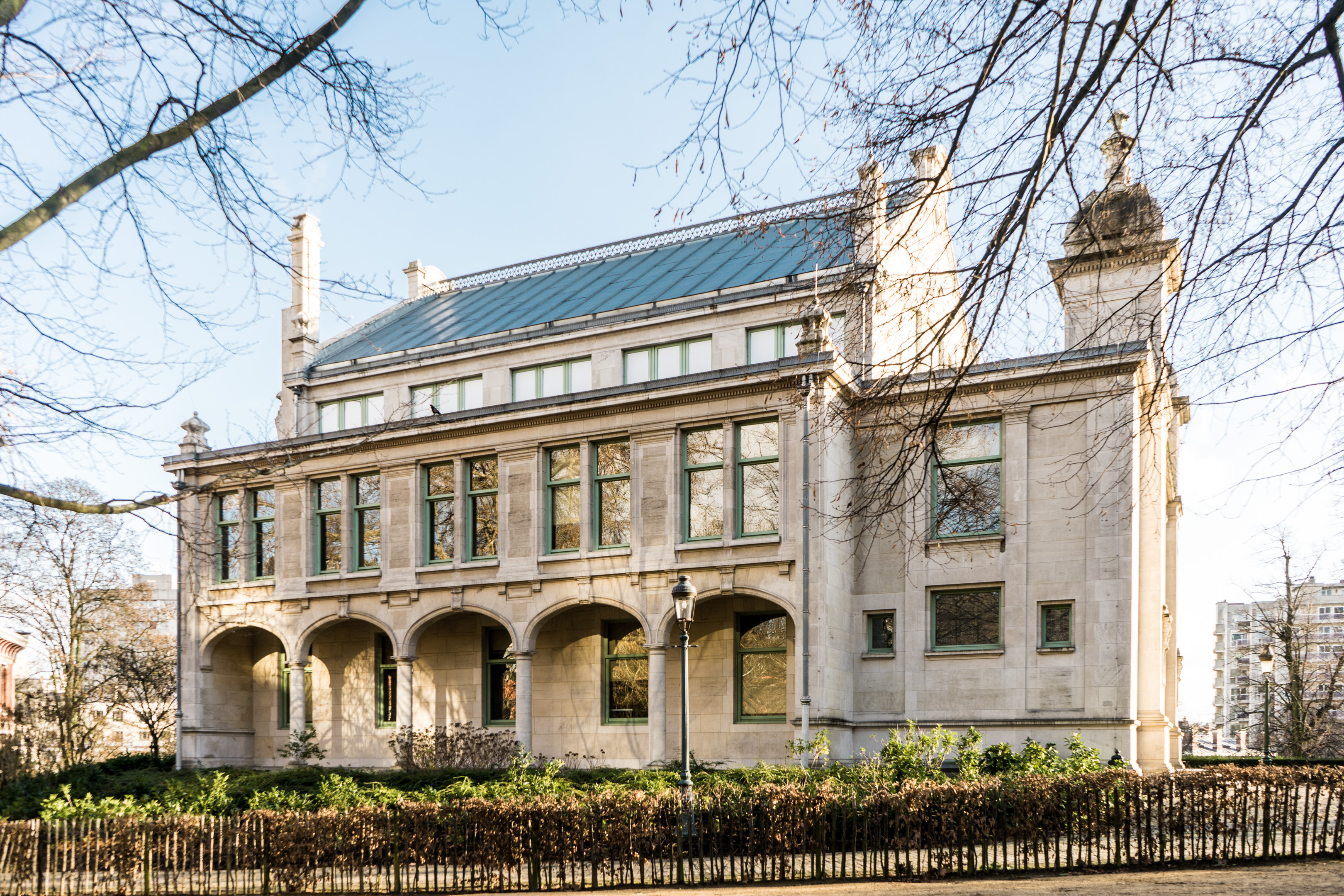 Bibliothèque solvay, institut de sciences